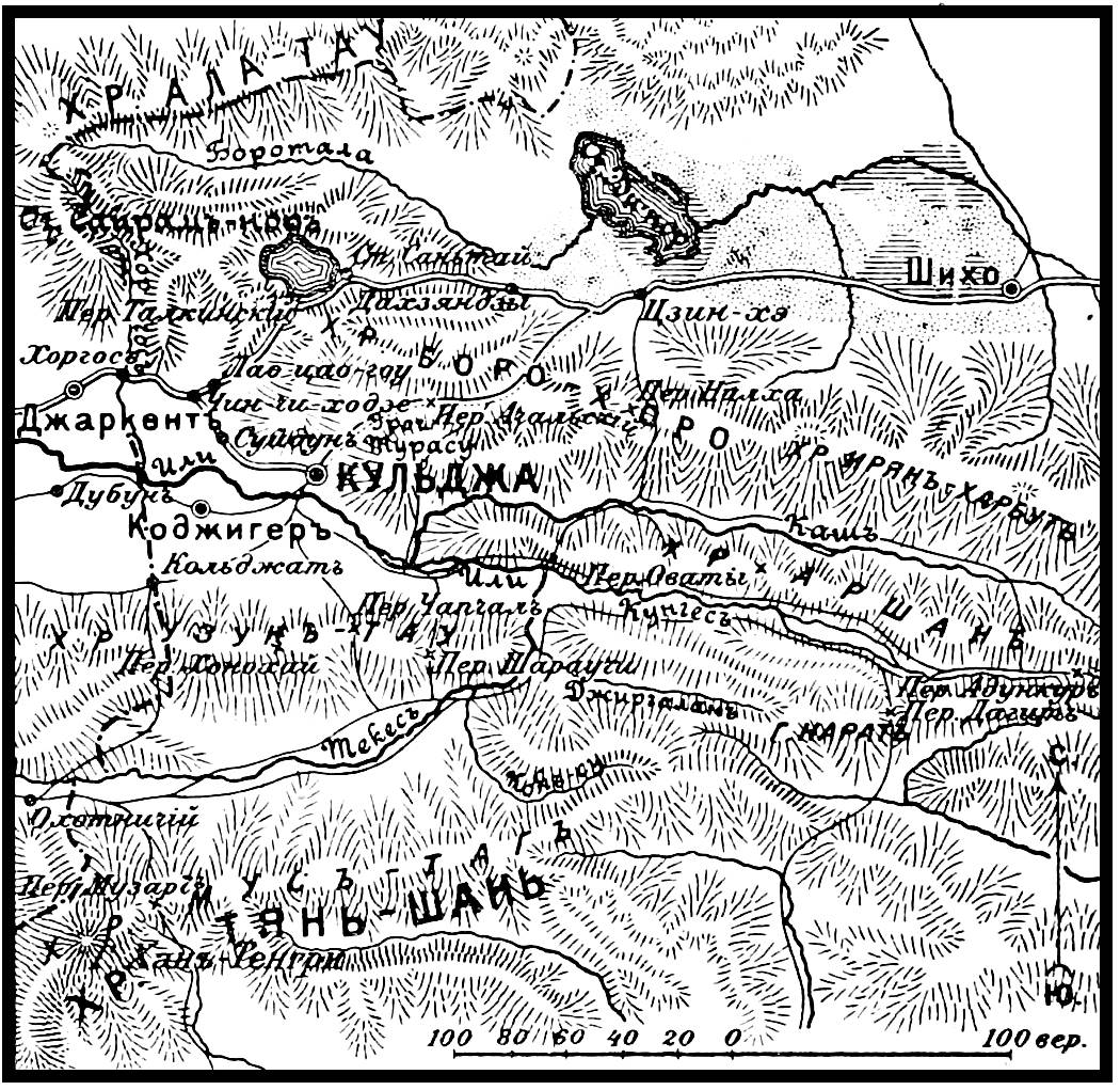 Это изображение было использовано для иллюстрирования статьи «Илийский край» опубликованной в десятом томе «Военной энциклопедии», который был издан книгоиздательским товариществом И. Д. Сытина в 1912—1913 гг. в столице Российской империи городе Санкт-Петербурге.